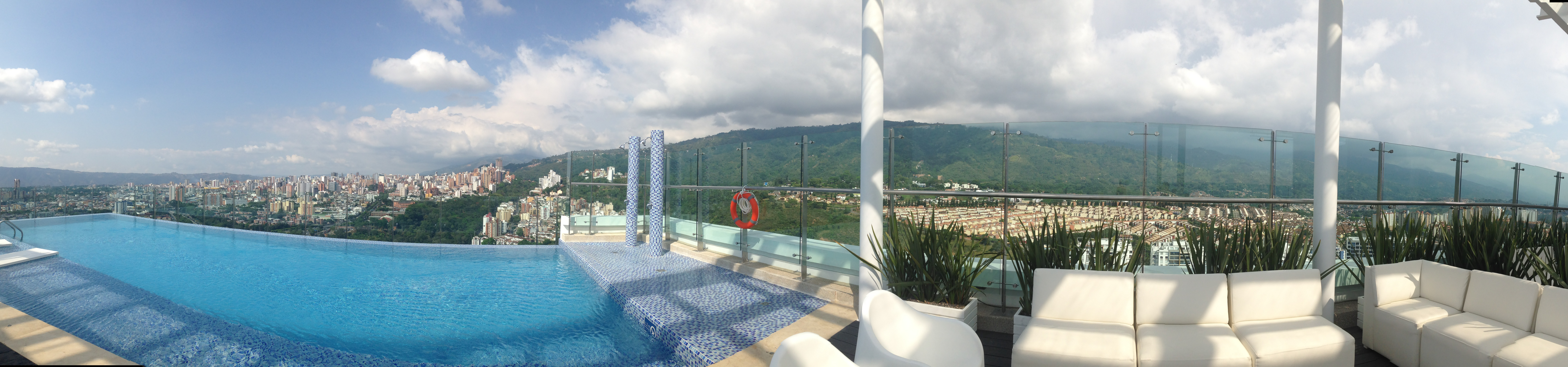 Vista de Bucaramanga desde la terraza del Hotel Holiday Inn de Bucaramanga